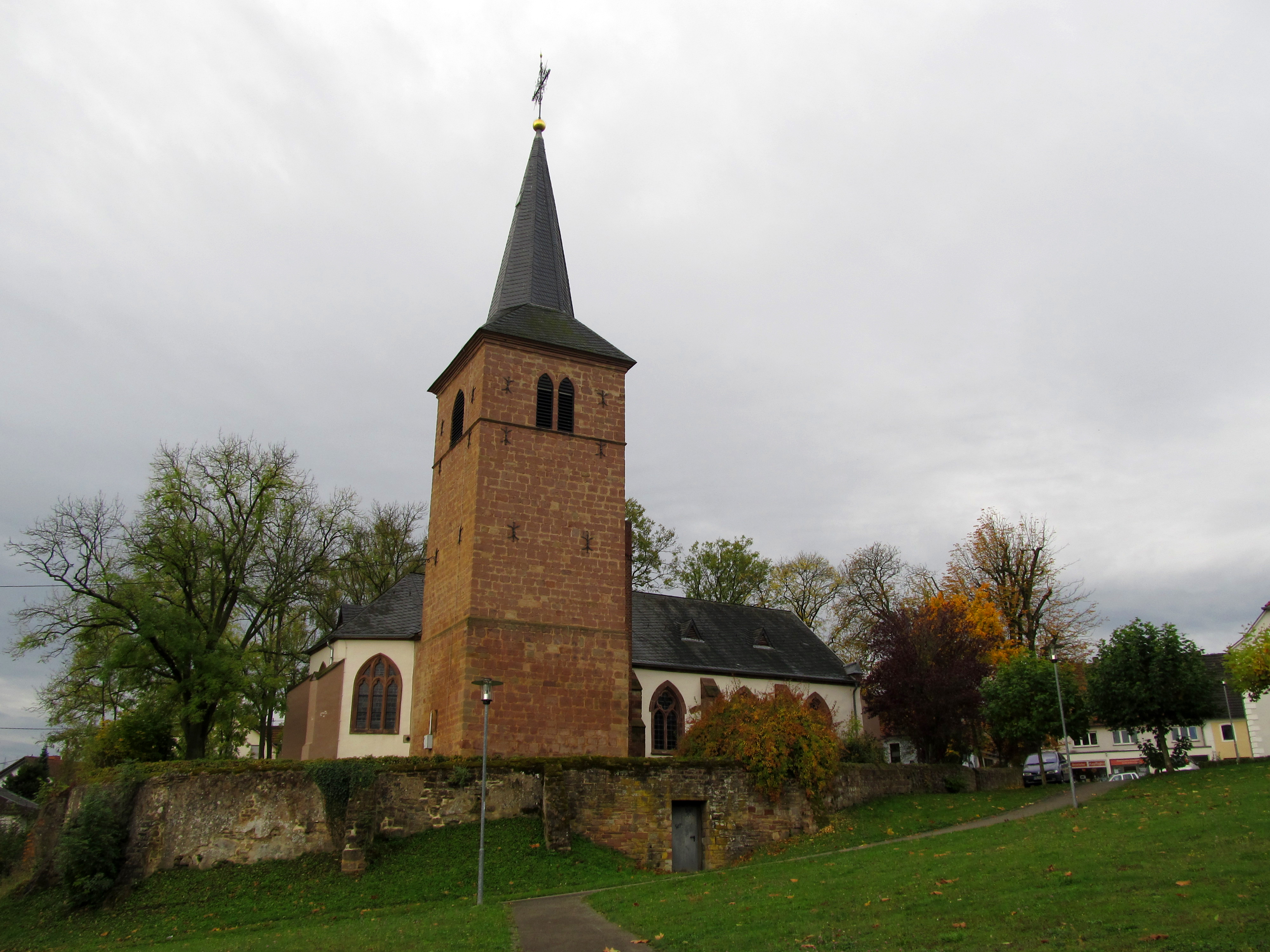 Die evangelische Martinskirche in Köllerbach, einem Stadtteil von Püttlingen, Saarland